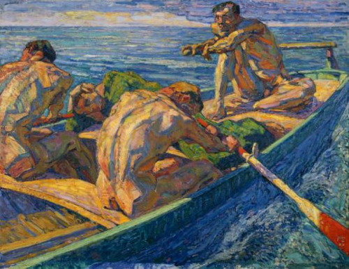 Otto Hettner, Les Rameurs.